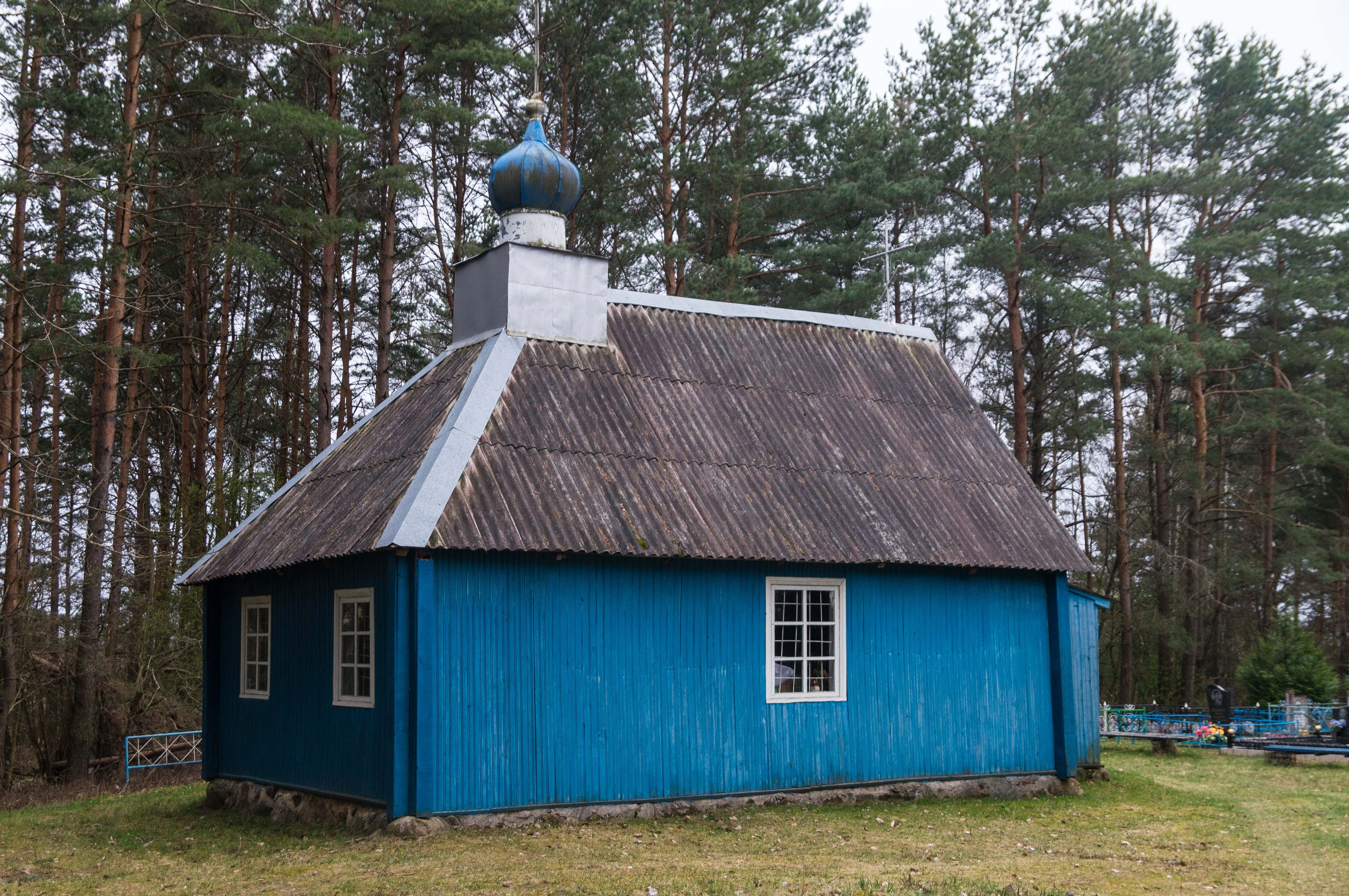 Свята-Мікалаеўская царква (Суднікі, Вілейскі раён)